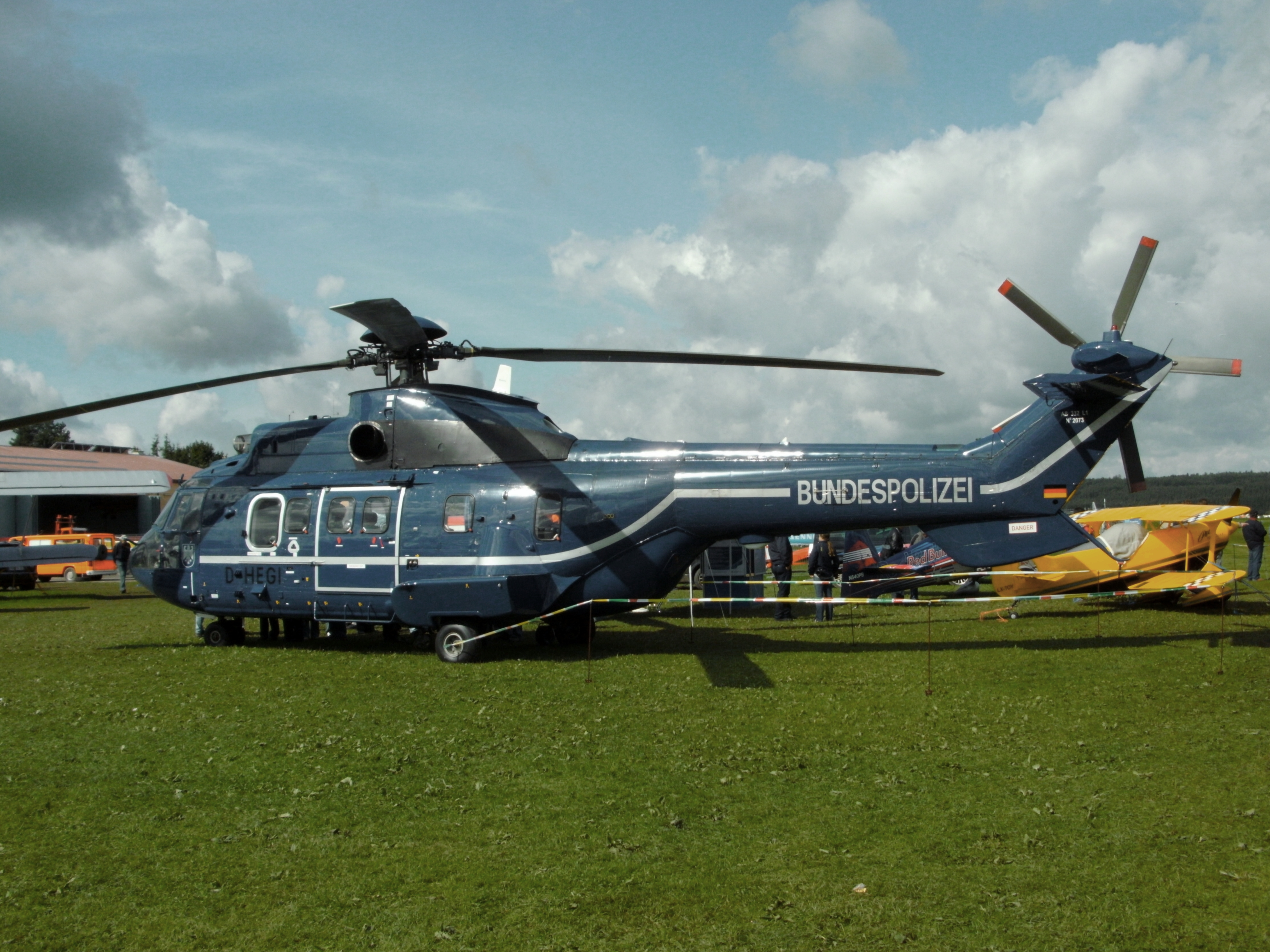 Tannkosh 2010 - Bundespolizei